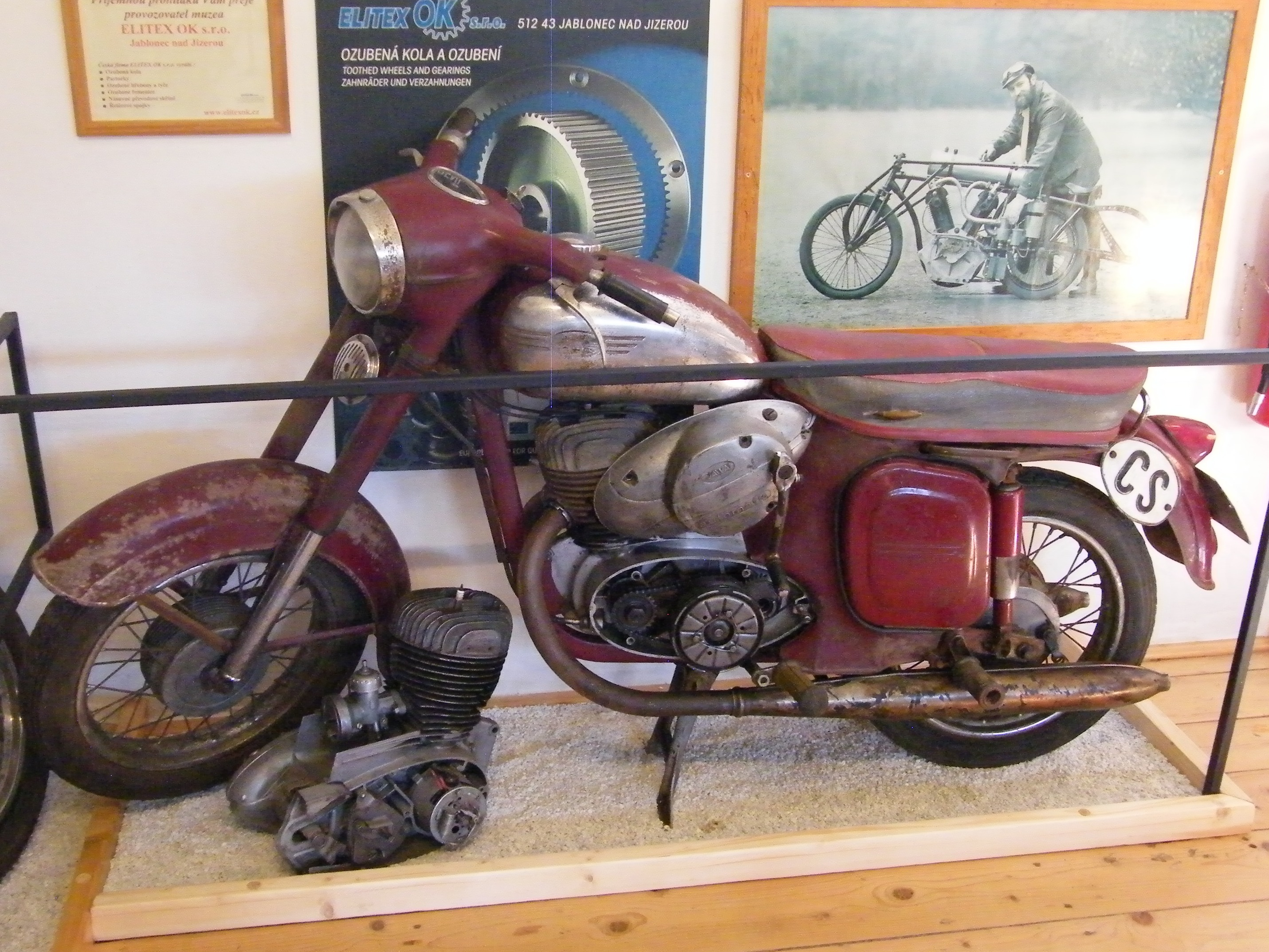 Jawa 250 Automatic